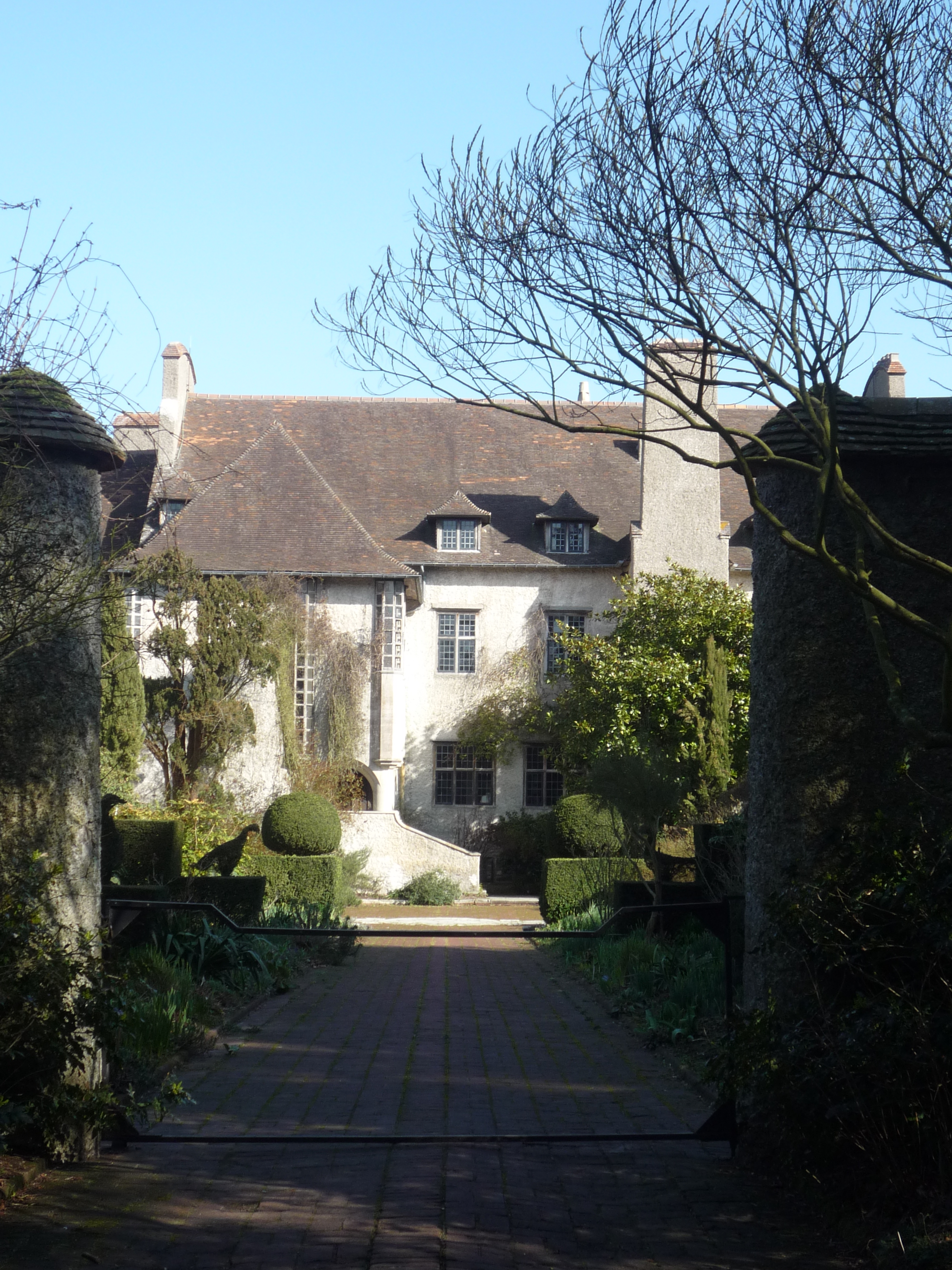 Maison du domaine du bois des Moutiers à Varengeville sur Mer